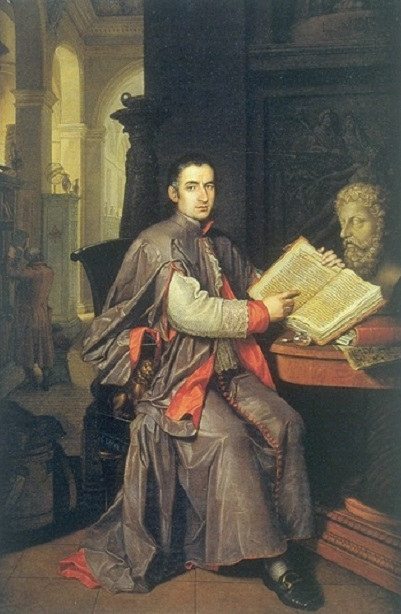 Ritratto di Angelo Mai, olio su tela, 142 x 215 cm., Musei civici, Piacenza